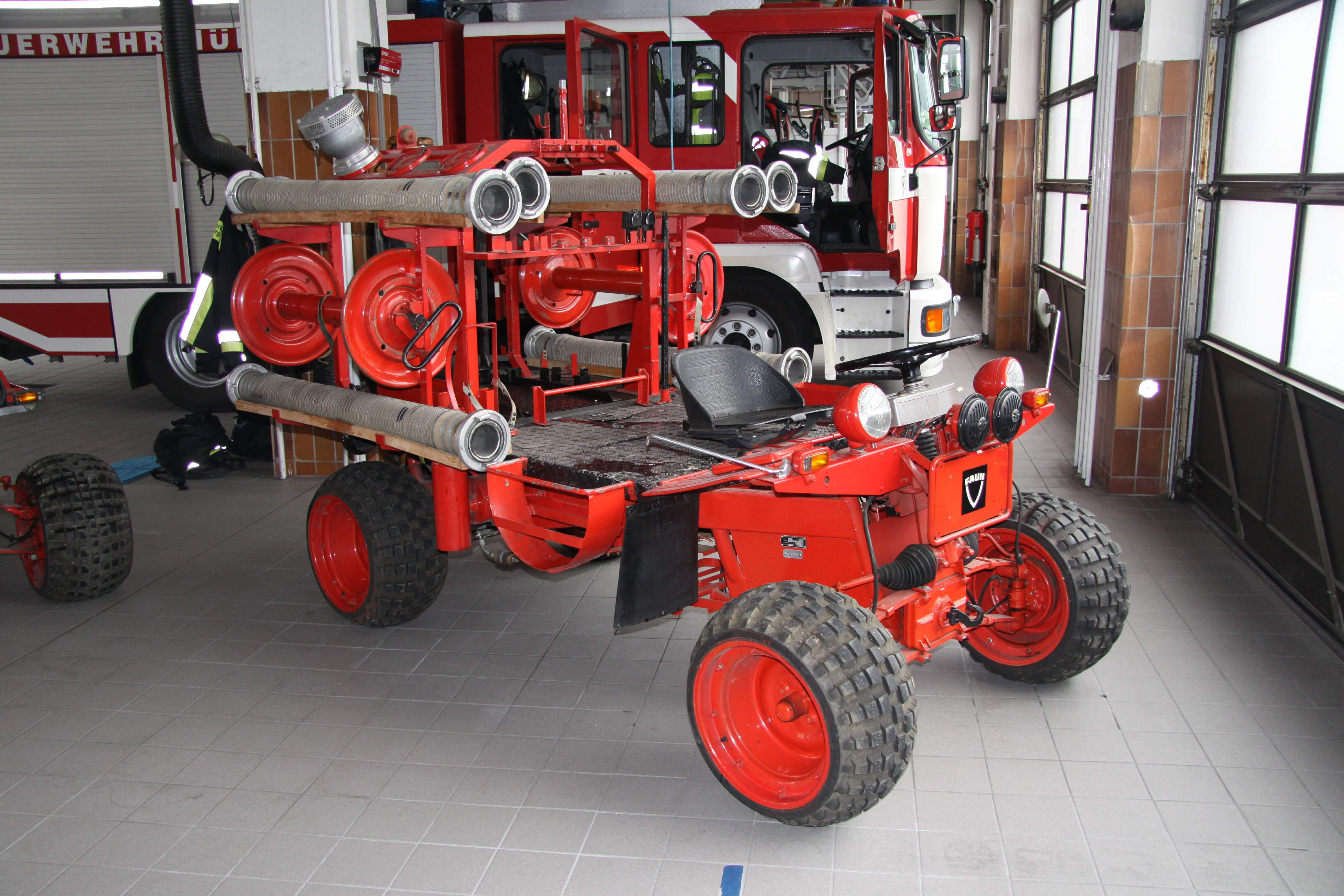 Kraftkarren (ehemals Werkfeuerwehr FAUN)